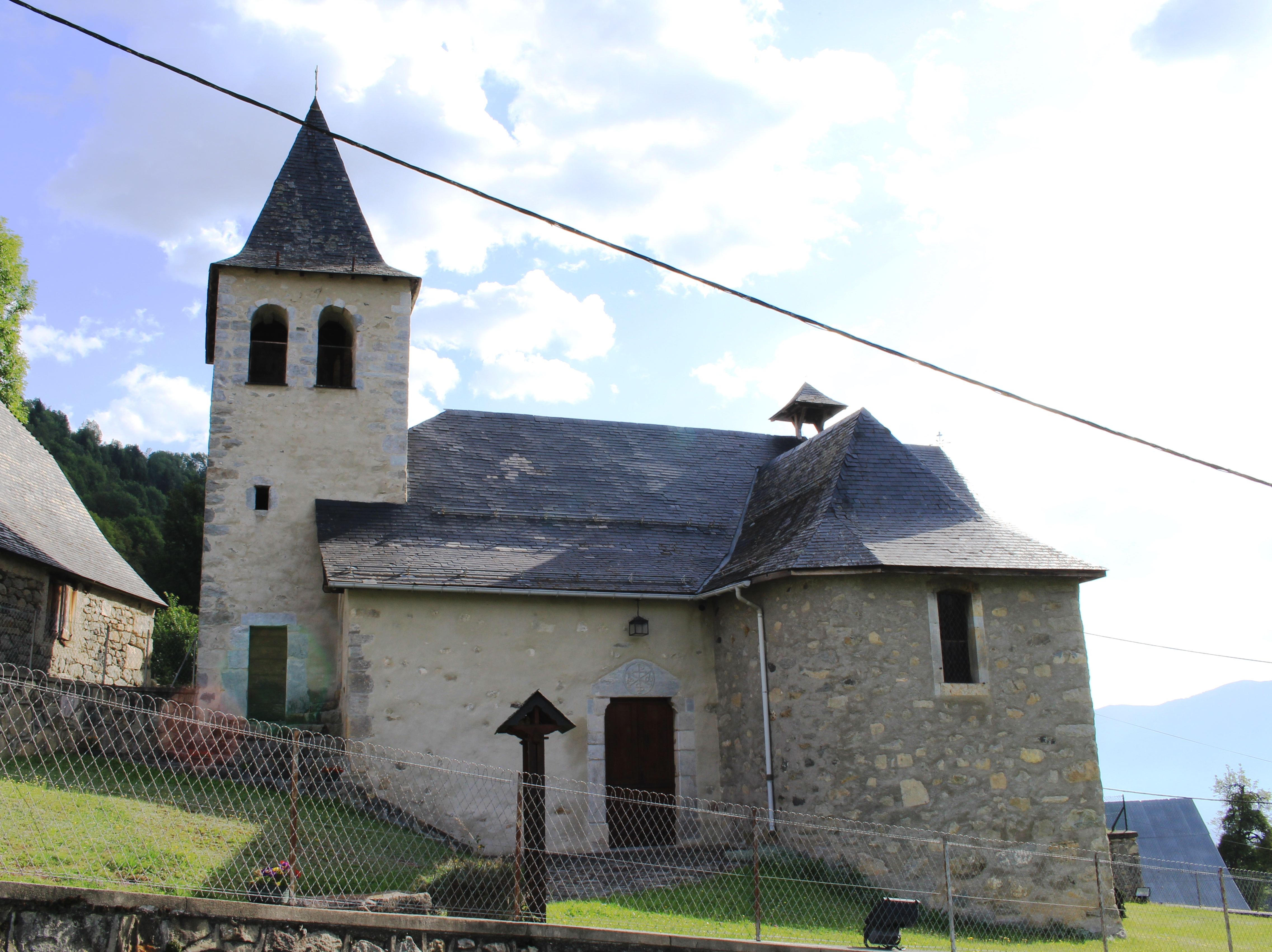 Église Saint-André d'Arcizans-Dessus (Hautes-Pyrénées)